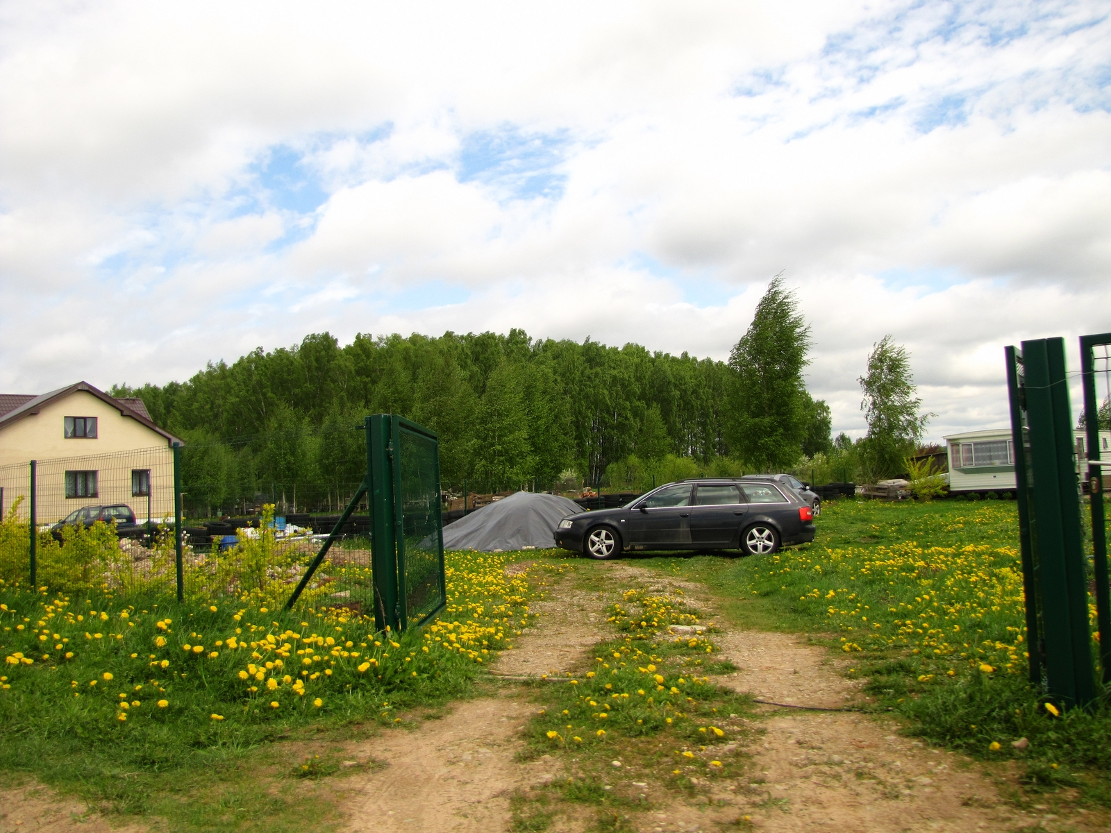 daugmale